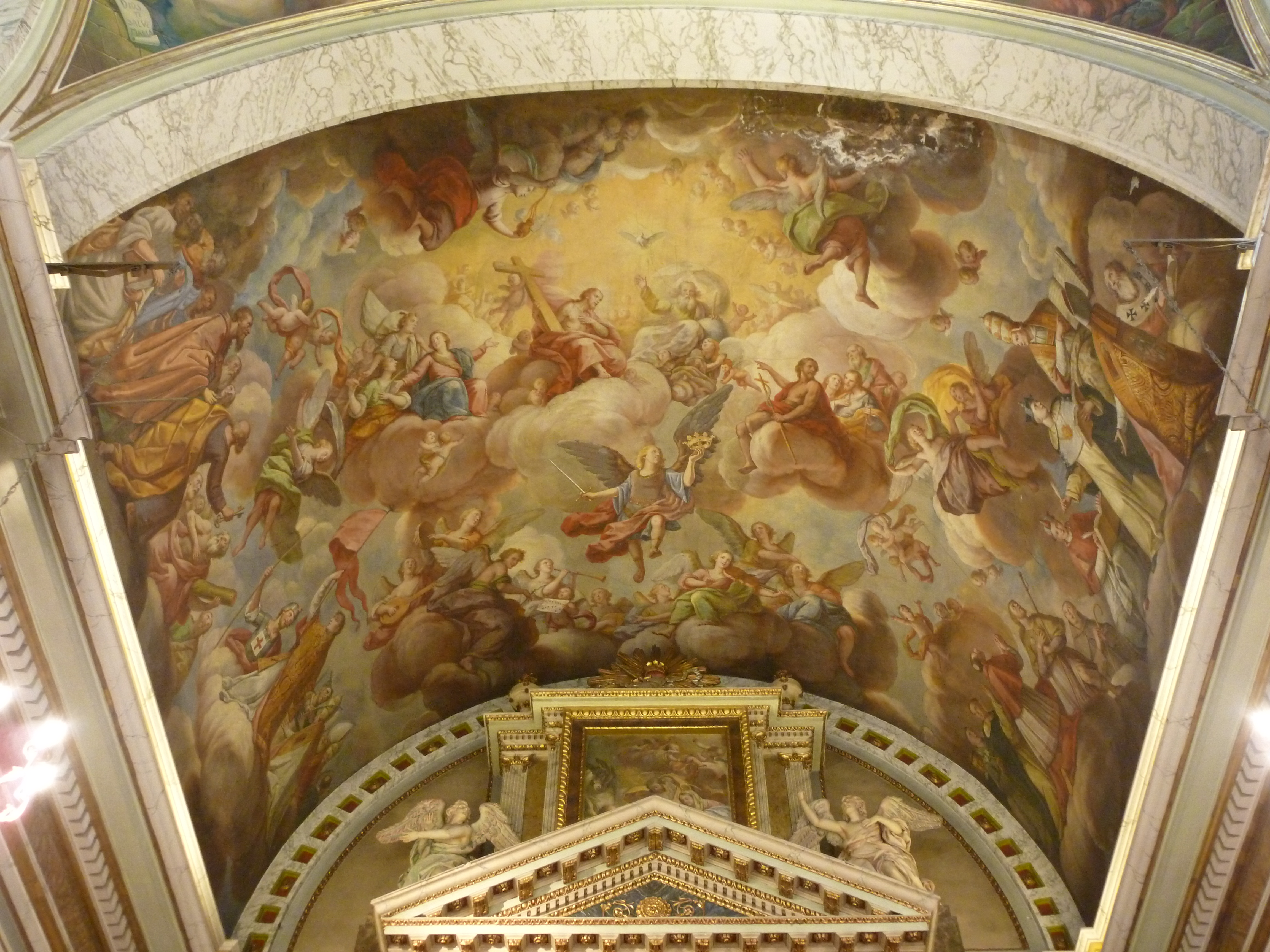 La Glòria (ca. 1769) de Josep Vergara Ximeno. Fresc situat a la volta del presbiteri, a l'església del Sant Àngel Custodi de la Vall d'Uixó (Plana Baixa)